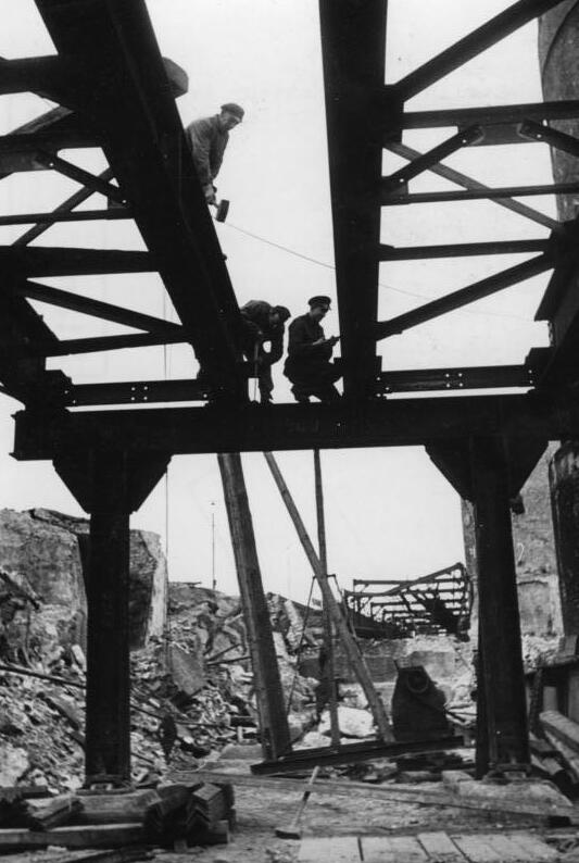 Berlin, Reparatur Hochbahnbrücke Berlin, um 1947 Berlin: Reparatur der Hochbahnbrücke an der Köthener Straße Illus-Cürlis